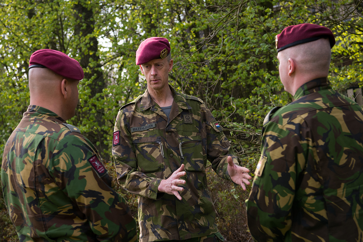 Deelen, 4 mei 2017. Commandant Luchtmobiele Brigade, brigadecammandant Kees Matthijsen.